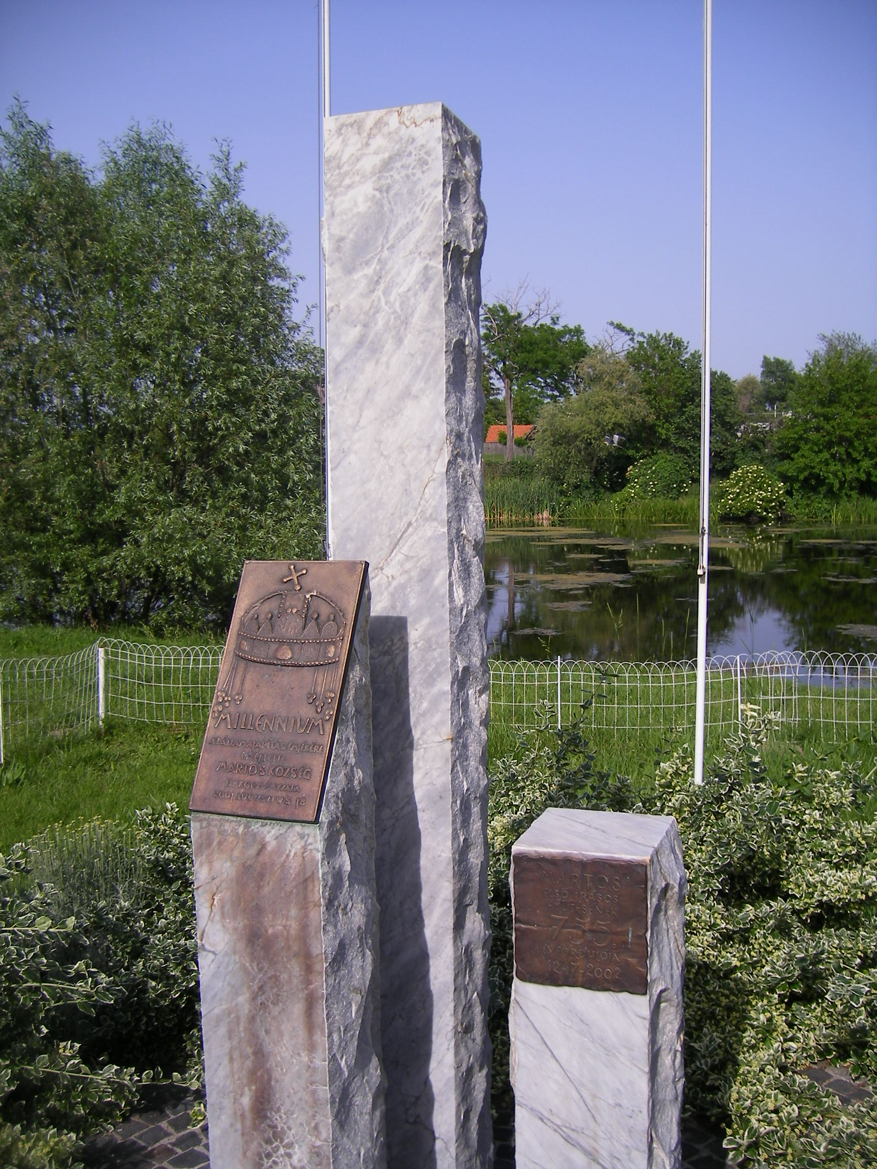 Martos - milleniumi emlékmű